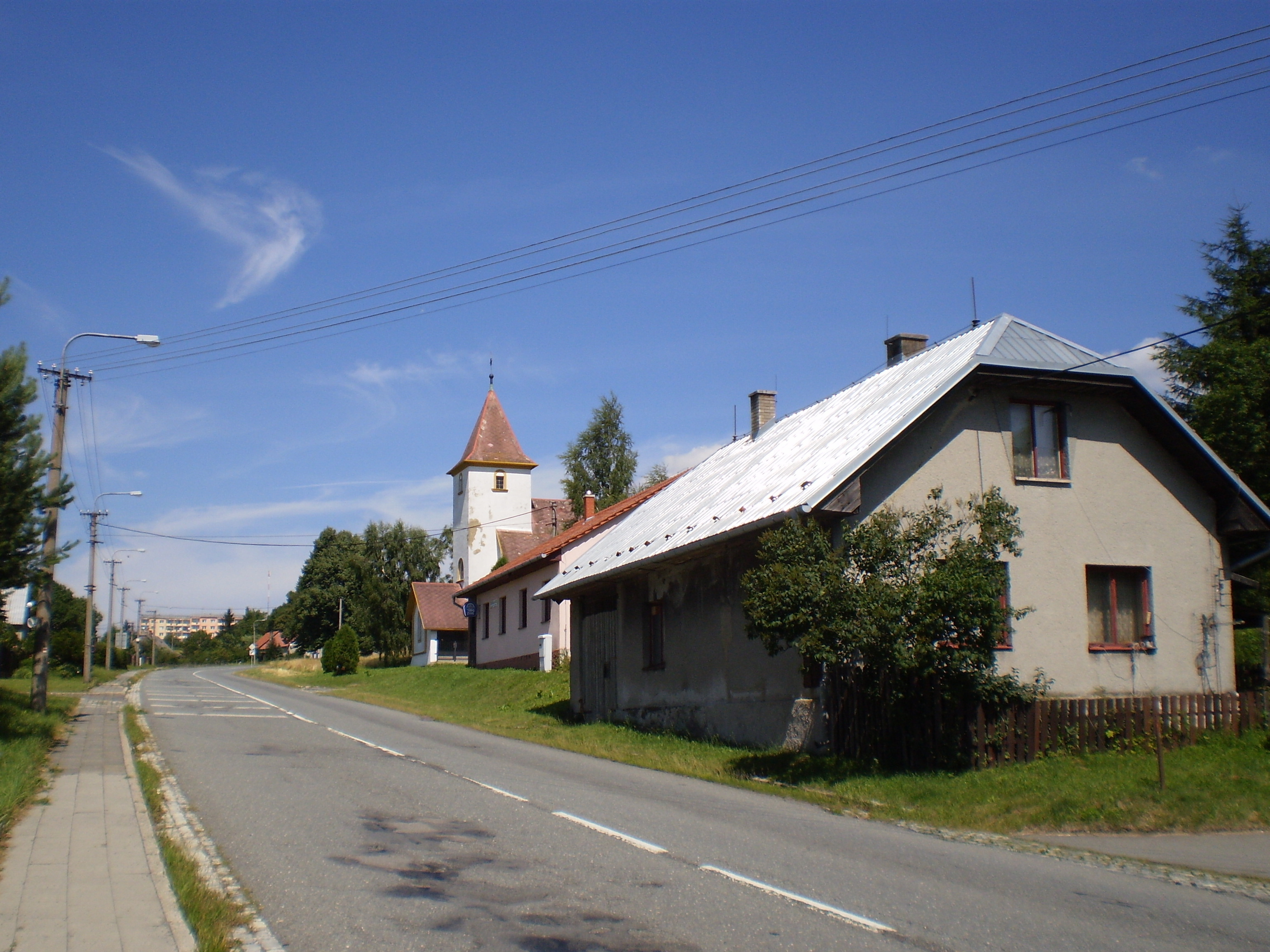 Kozlov